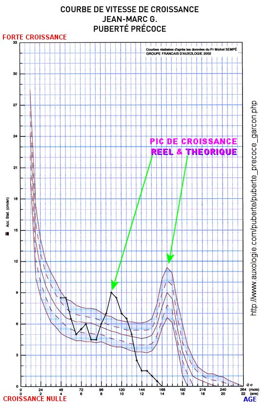 Graphique " commenté - Source : Auxologie méthode est séquences. Sempé M., Pédron G. Roy-Pernot M.P., Rolland-Cachera M.F. Auxologie méthode et séquences 2ème édition Méditions Lyon.